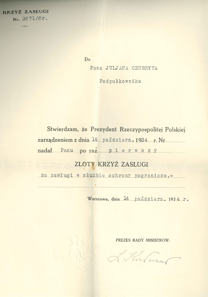 Nadanie ZKZ